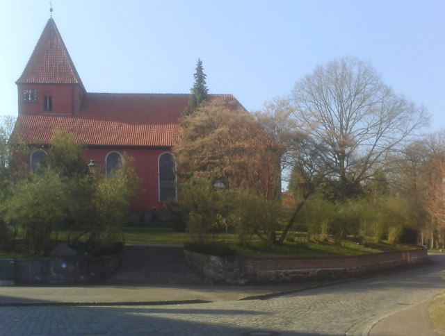 Kirchlinteln: Kirche